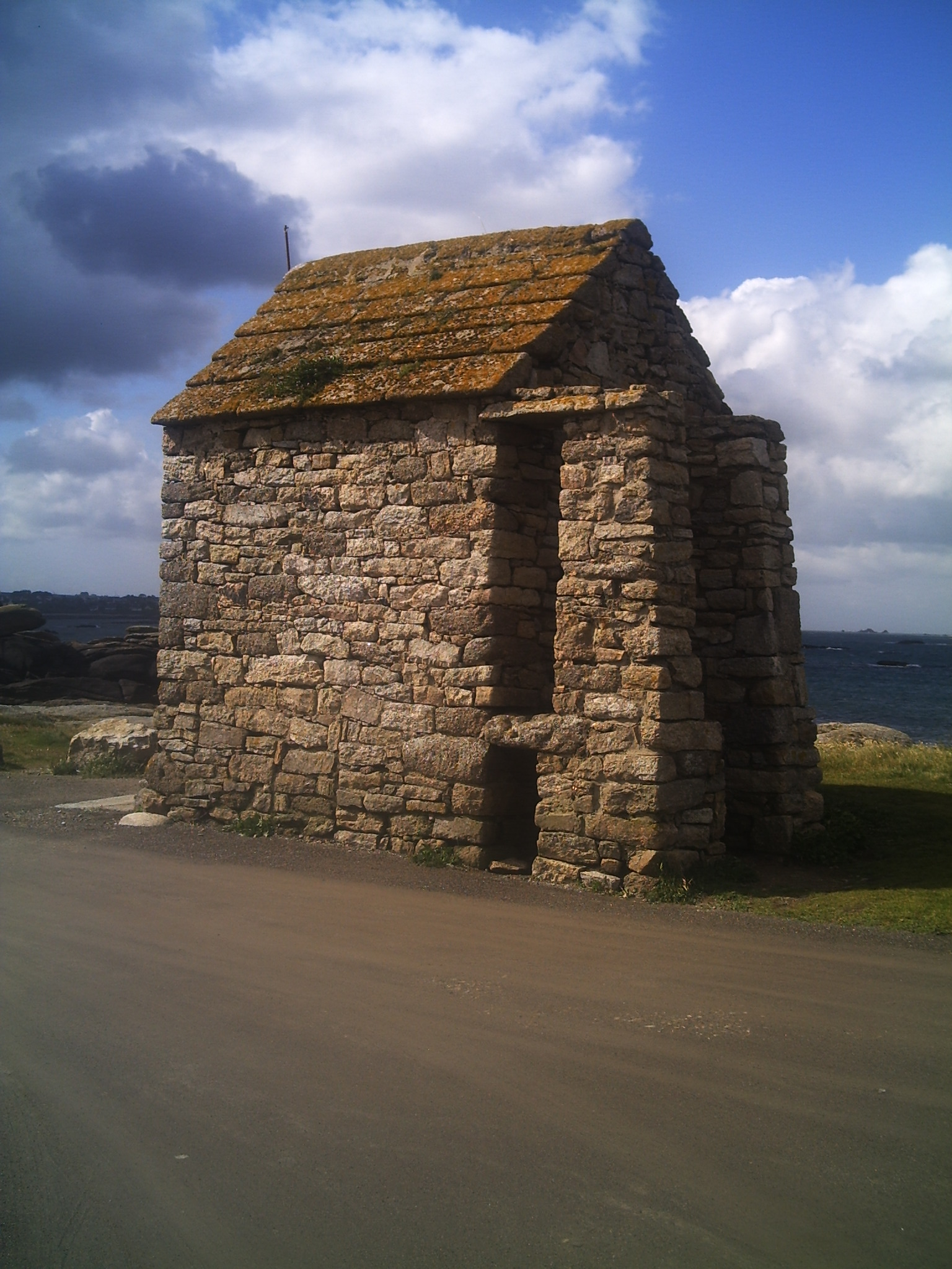 Poudrière - entrée de Port Melon (Porspoder)